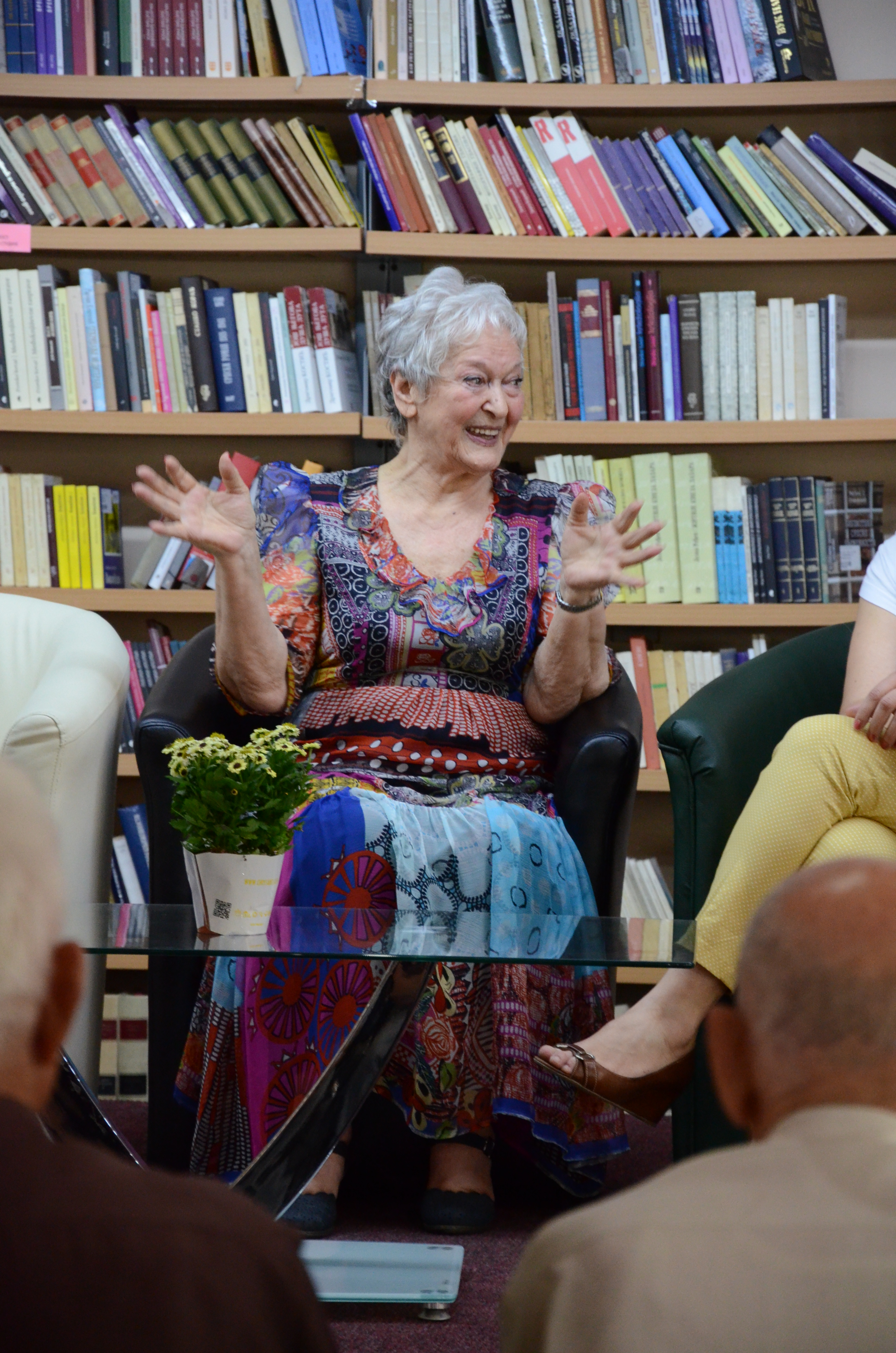 Dušica Jonić prilikom otvaranja njenog legata u Narodnoj biblioteci Pirot